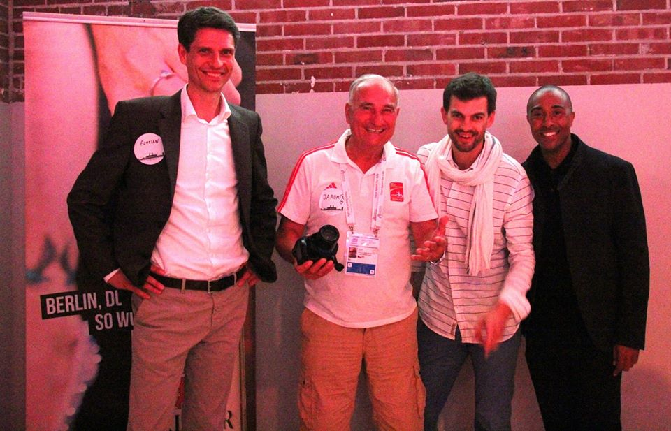 Florian Schwarthoff (links), Ingo Pawelke (2.v.r.) und Colin Jackson (rechts) bei der "Midnight Reception" des DLV bei den Leichtathletik-Europameisterschaften am 9.7.2016